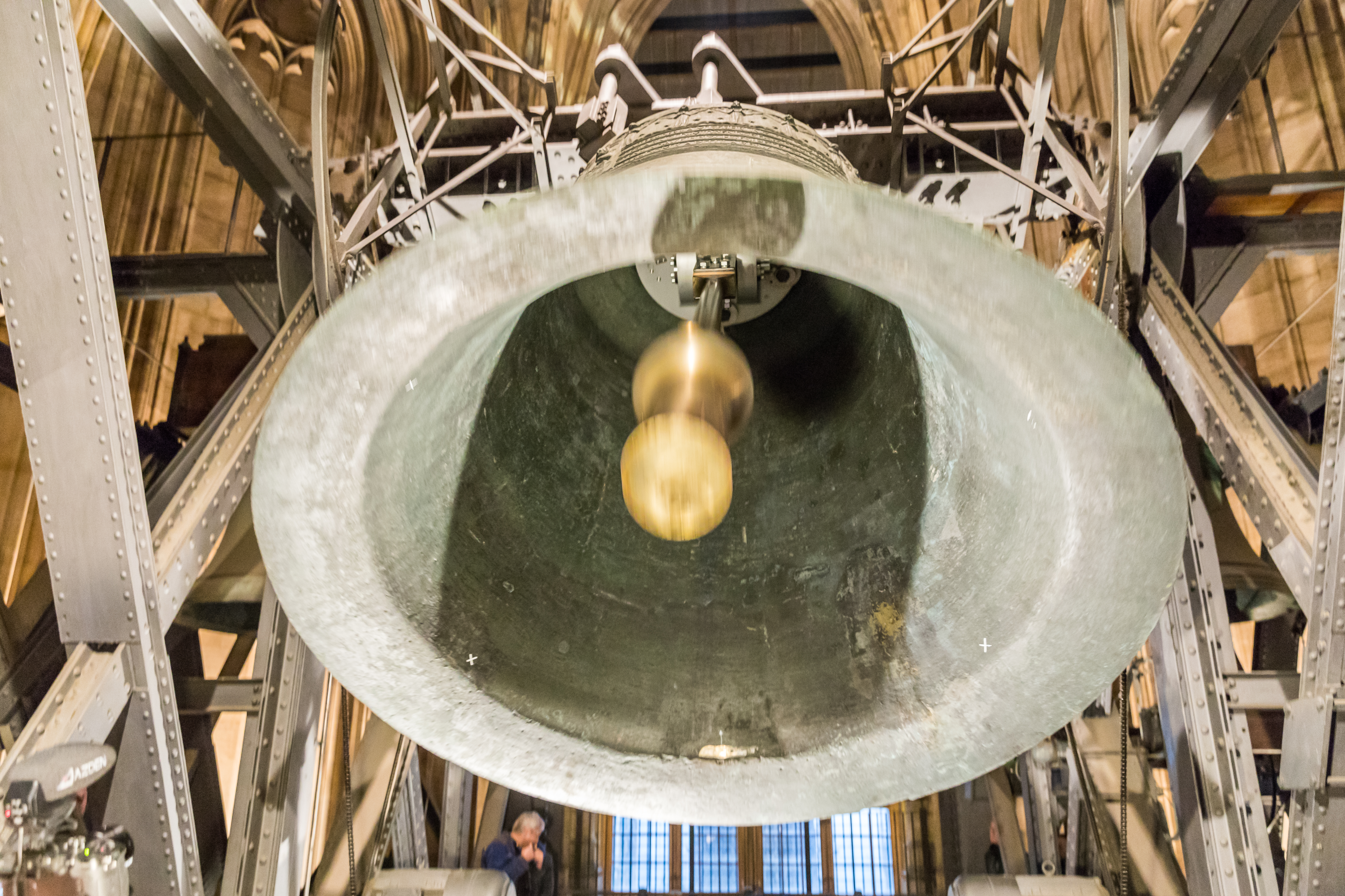 Pressetermin zum Probeläuten des Dicker Pitter (St. Petersglocke) im Kölner Dom nach Montage einer neuen Klöppelaufhängung. Foto: Glocke und Klöppel in Bewegung